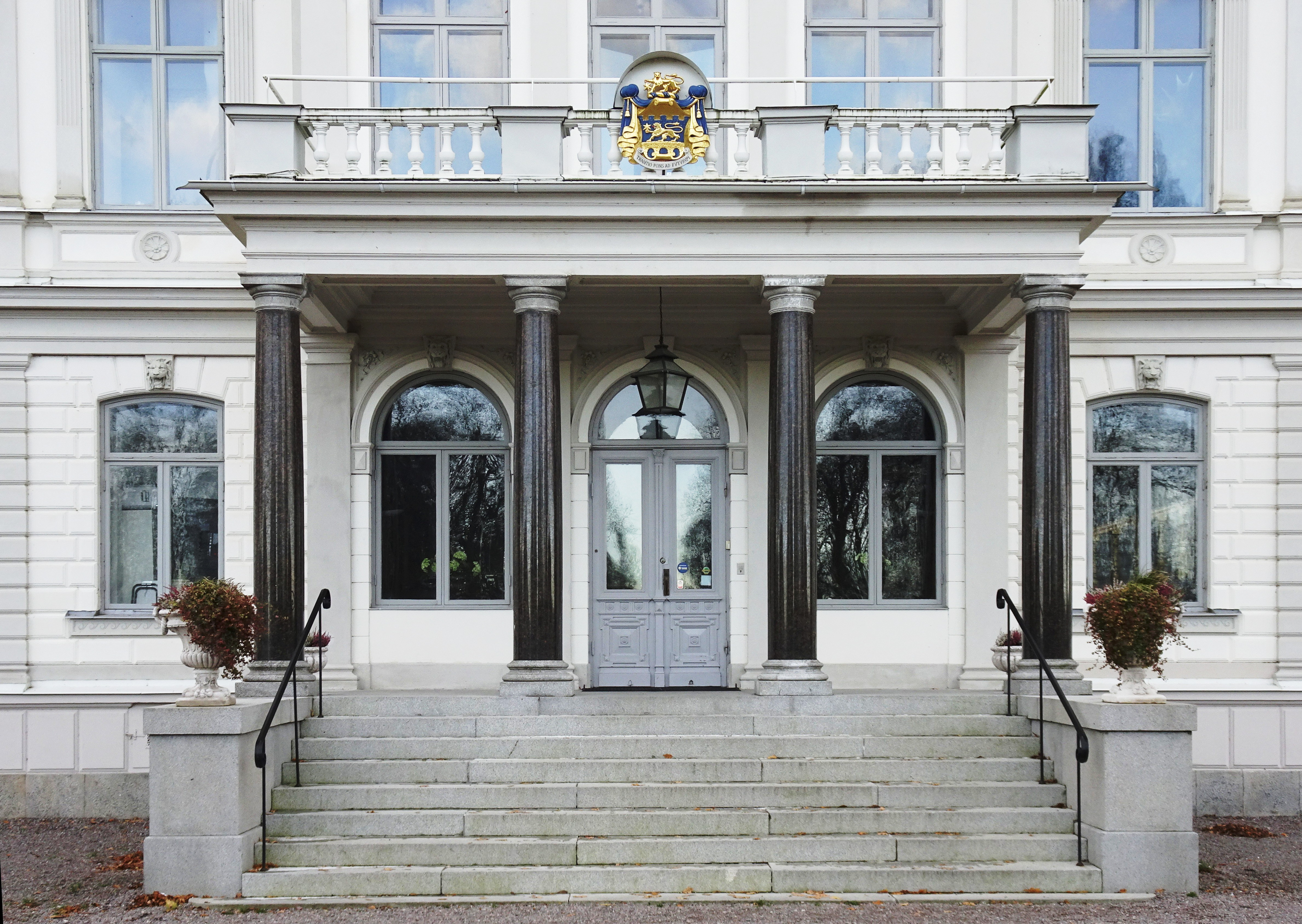 Brogård, fasad mot norr, detalj